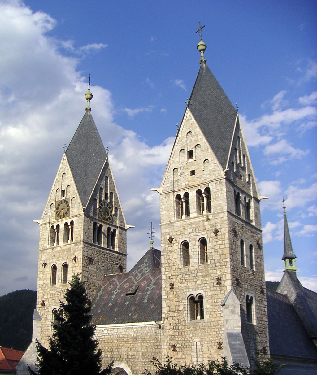 Stadtpfarrkirche in Friesach Kärnten, selbst fotografiert, August 2005, abends